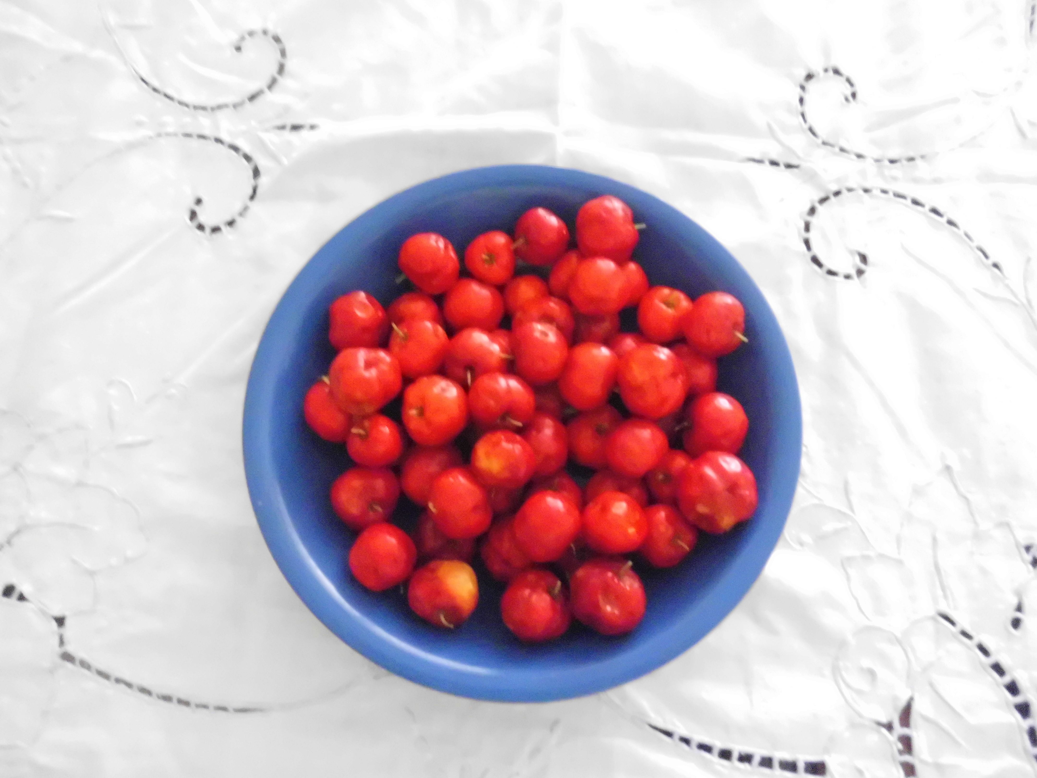 Malpighia emarginata